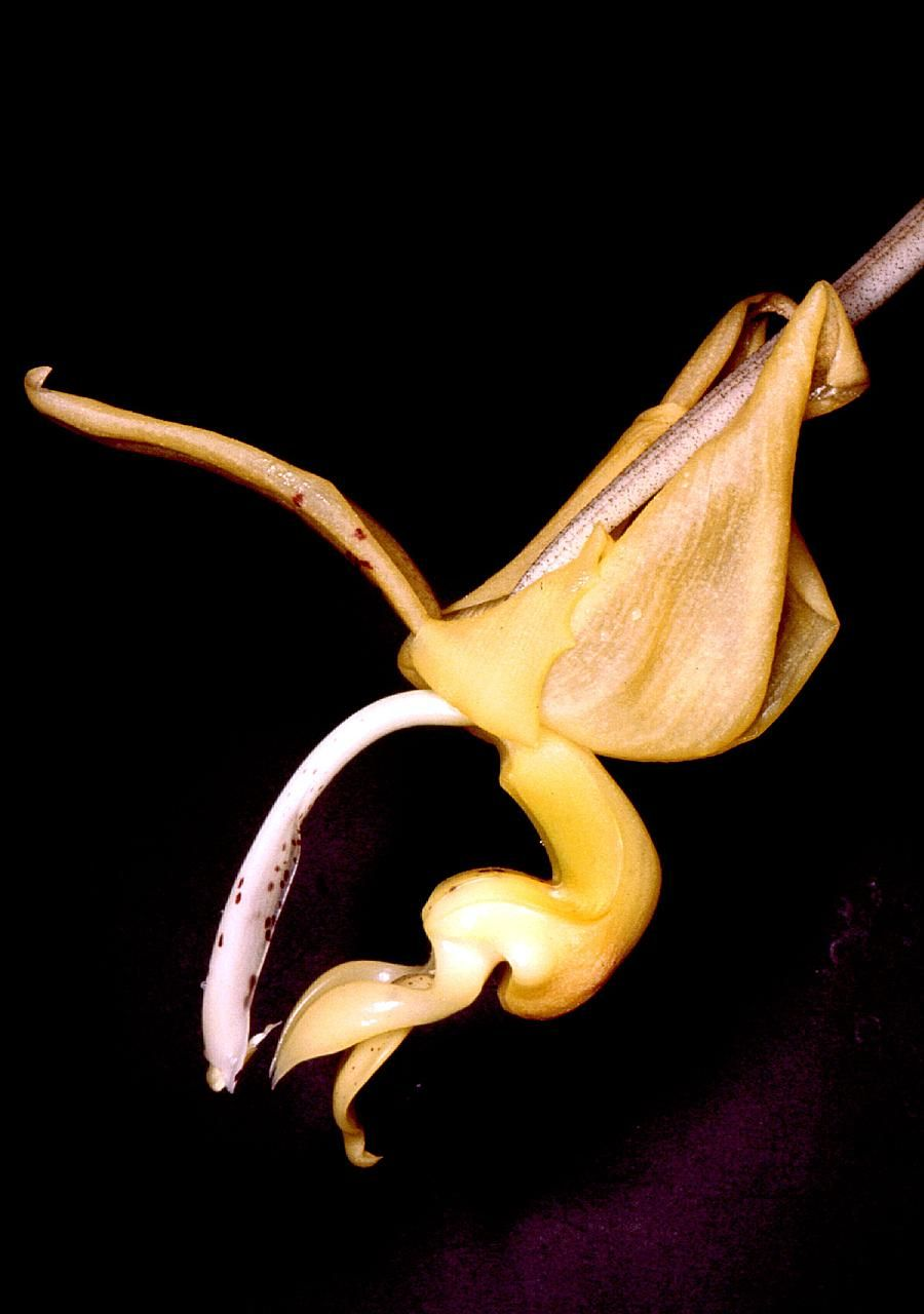 Stanhopea stevensonii